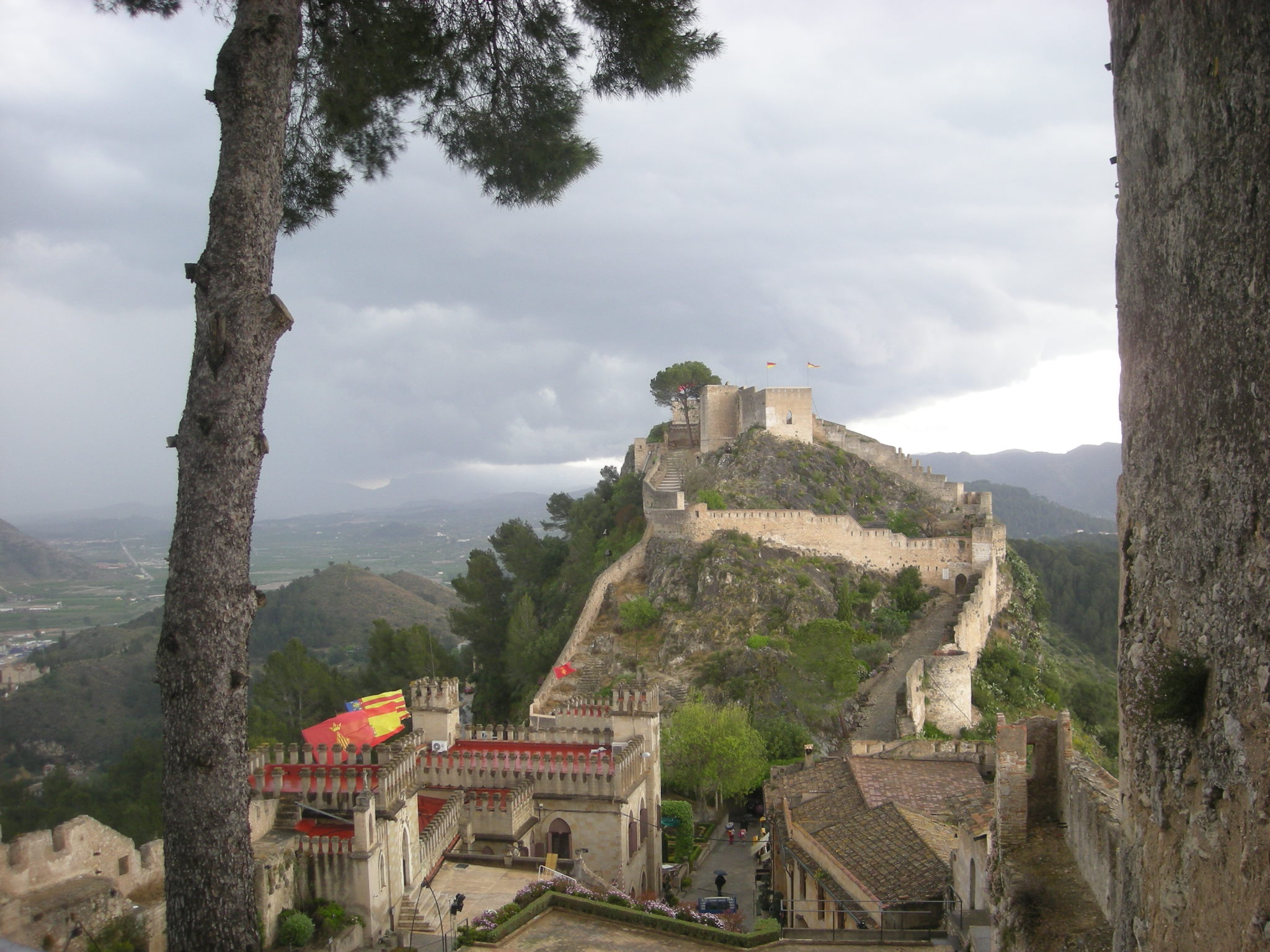 Castell Menor des del castell Major.